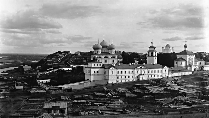 Вятский Успенский Трифонов монастырь, конец 19 - начало 20 века.